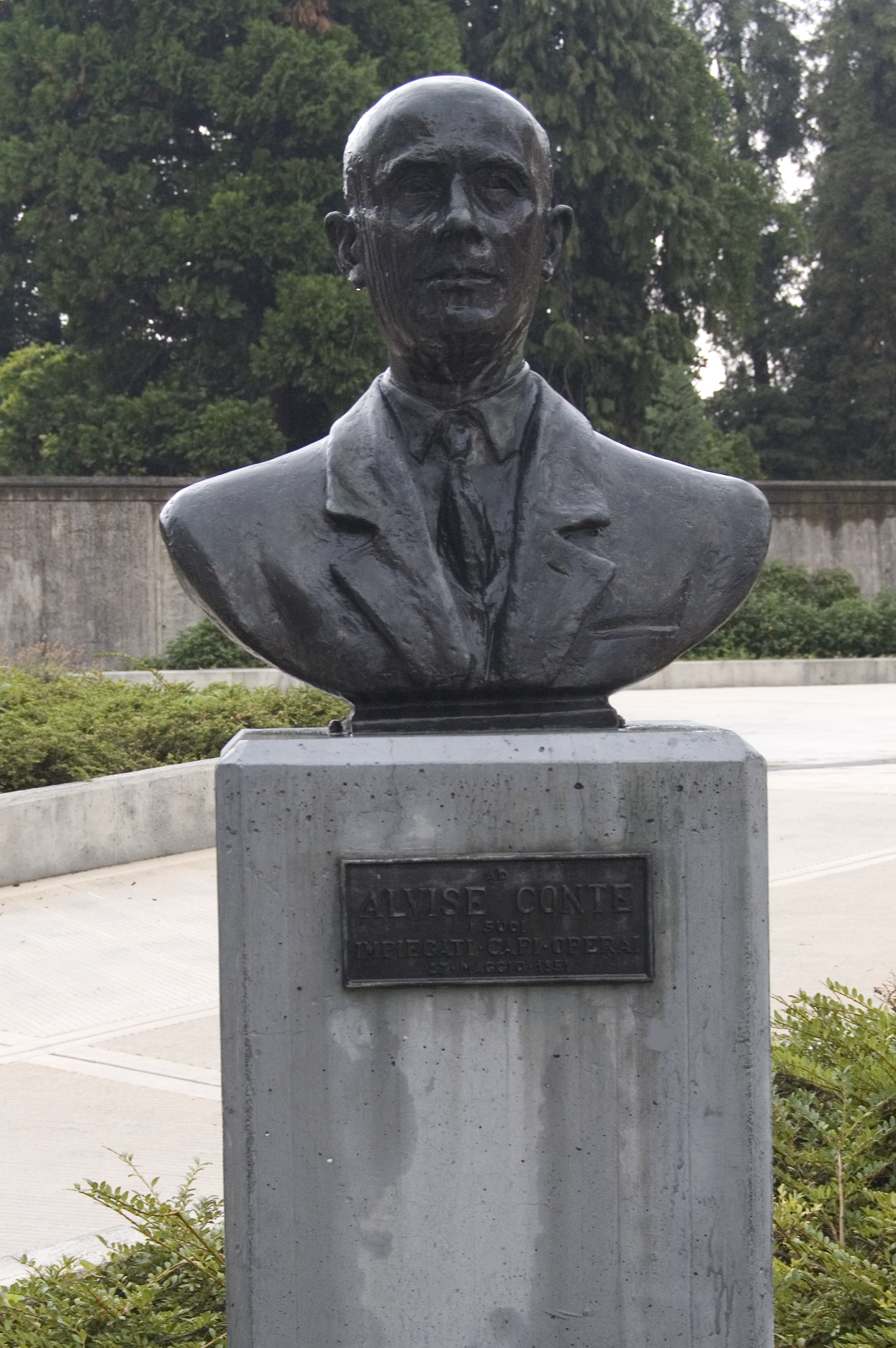 Piazza Alvise Conte e busto di Alvise Conte This is a photo of a monument which is part of cultural heritage of Italy.